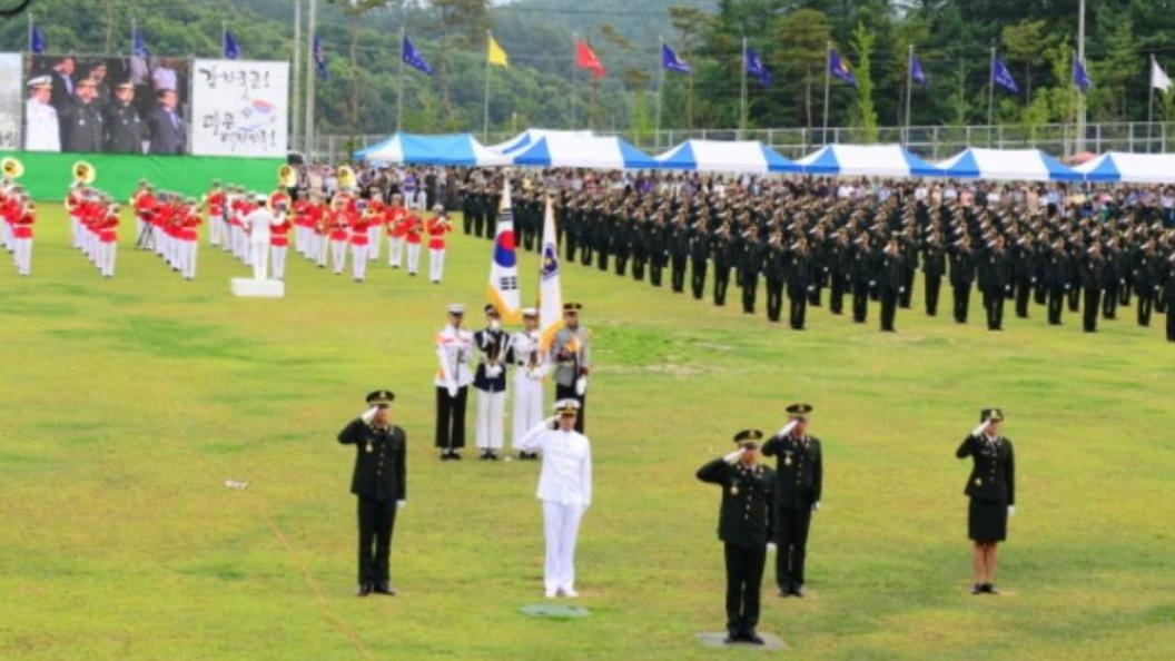 학사장교 임관식